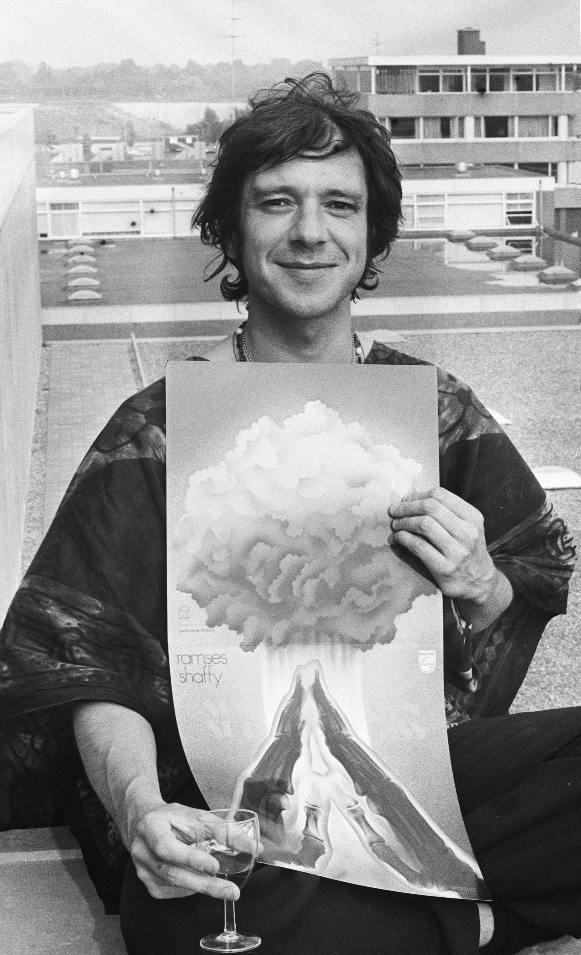 Ramses Shaffy met nieuwe langspeelplaat ["Sunset Sunkiss"] te Amsterdam